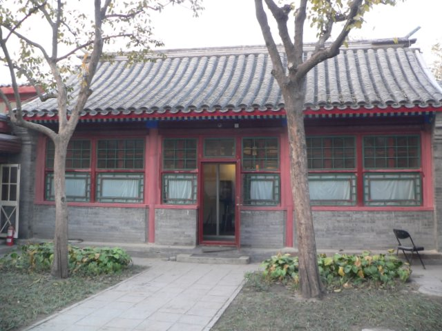 北京老舍故居 拍摄